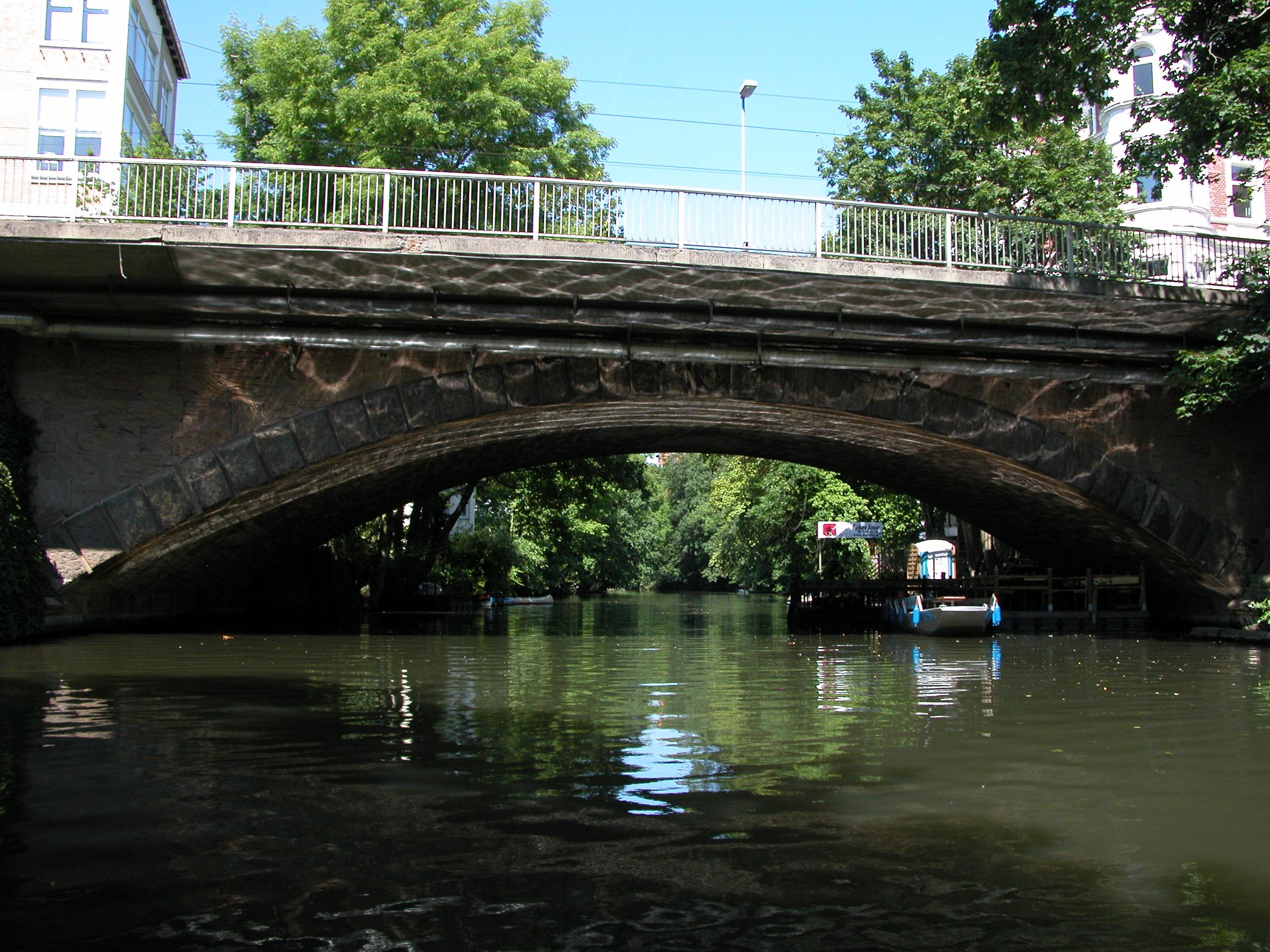 Braunschweig: Leonhardbrücke von Südwesten gesehen.